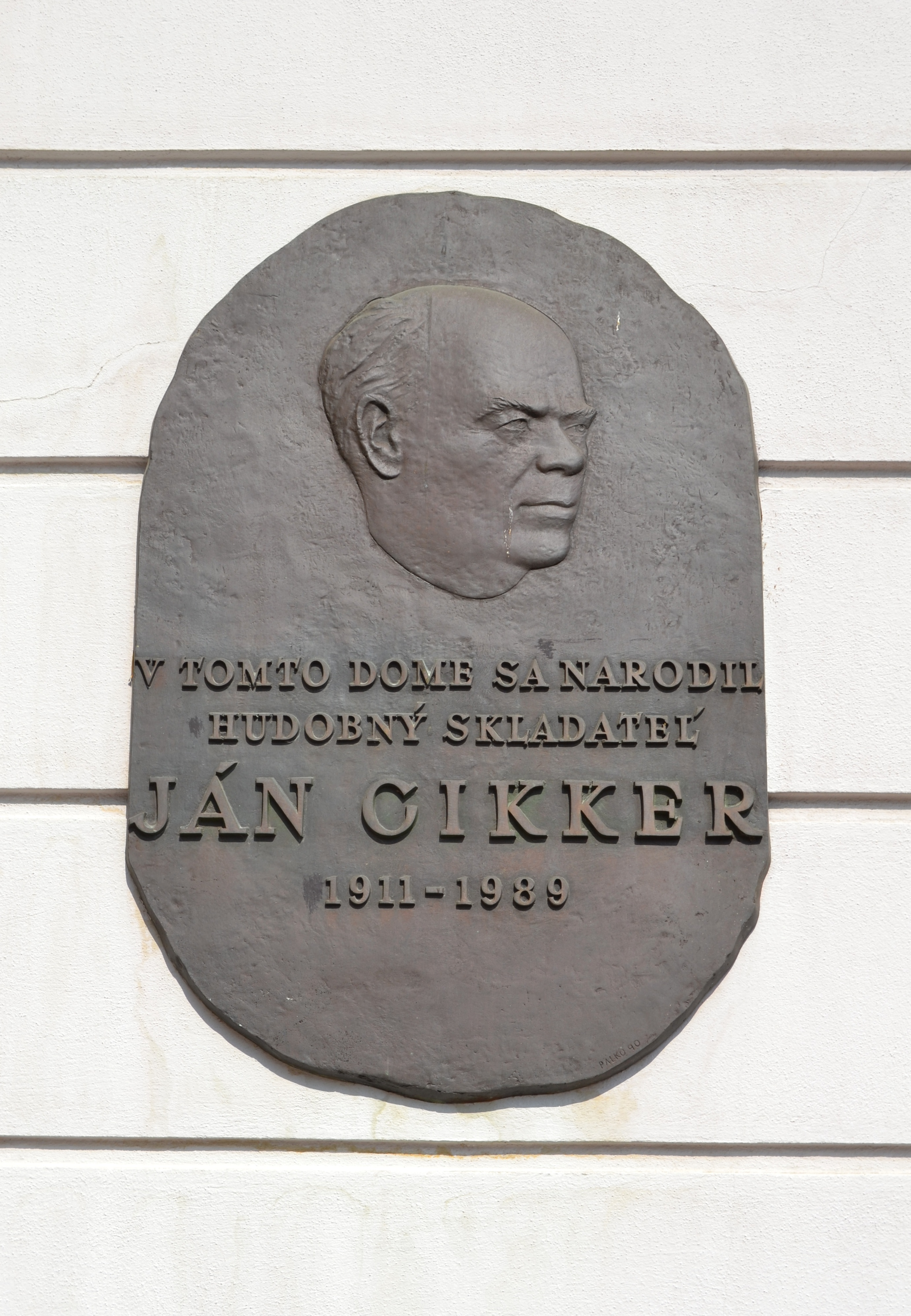 Banská Bystrica, Námestie Štefana Moyzesa 9, pamätná tabuľa na renesančnom meštianskom dome z prvej polovice 17. storočia, v ktorom sa narodil známy hudobný skladateľ Ján Cikker, popredný predstaviteľ slovenskej hudobnej moderny, držiteľ Ceny UNESCO za hudbu.